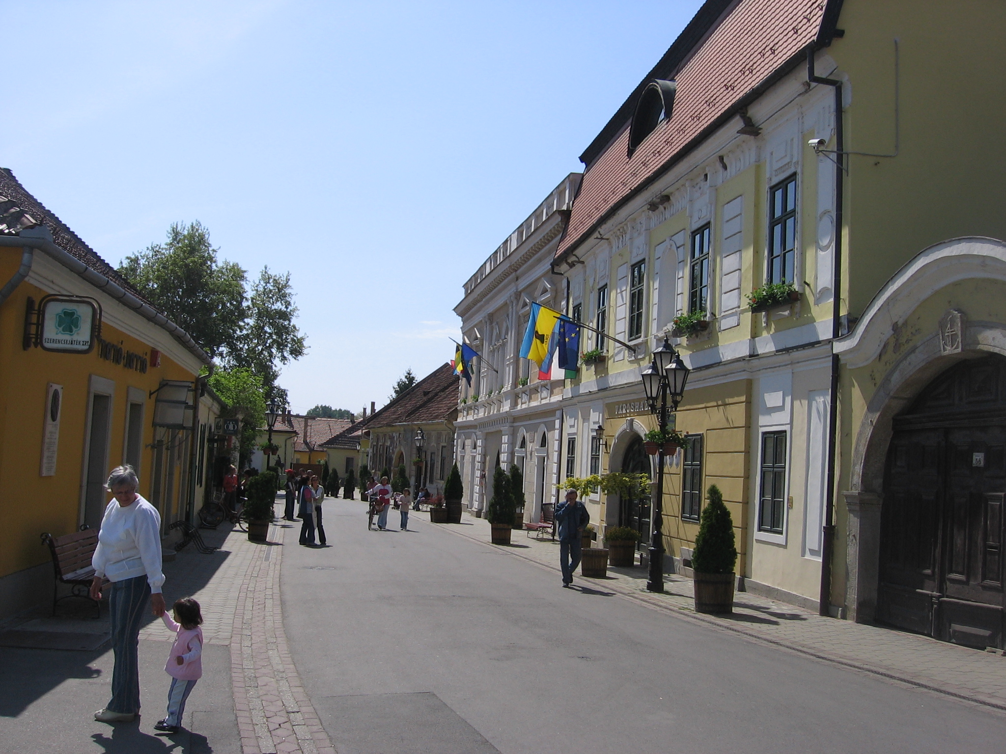 City hall (varoshaza) in Tokaj Ratusz (varoshaza) w Tokaju